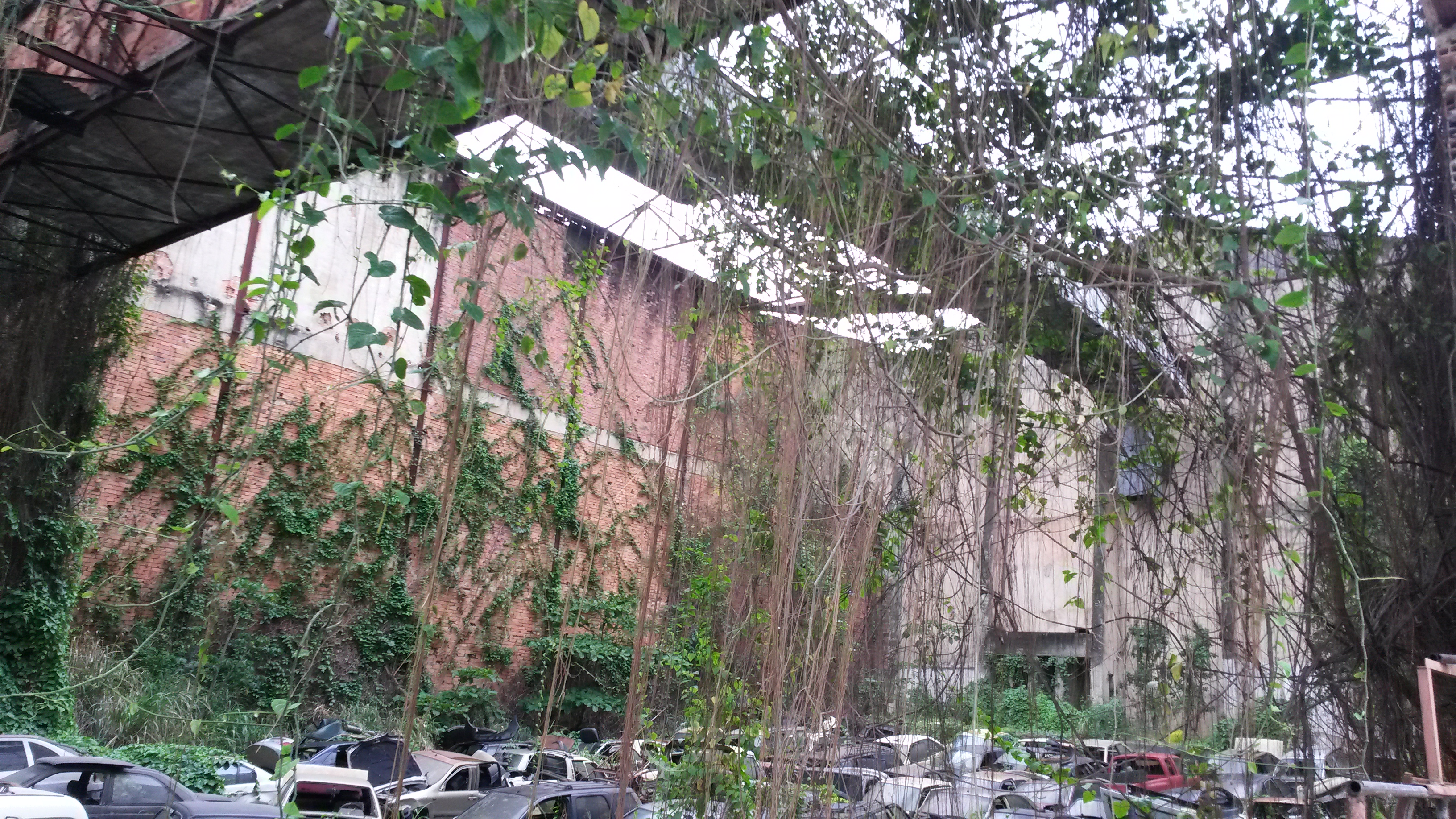 Antiga estrutura do cinema Cine Rio Palace, no bairro de Ramos, Rio de Janeiro, RJ